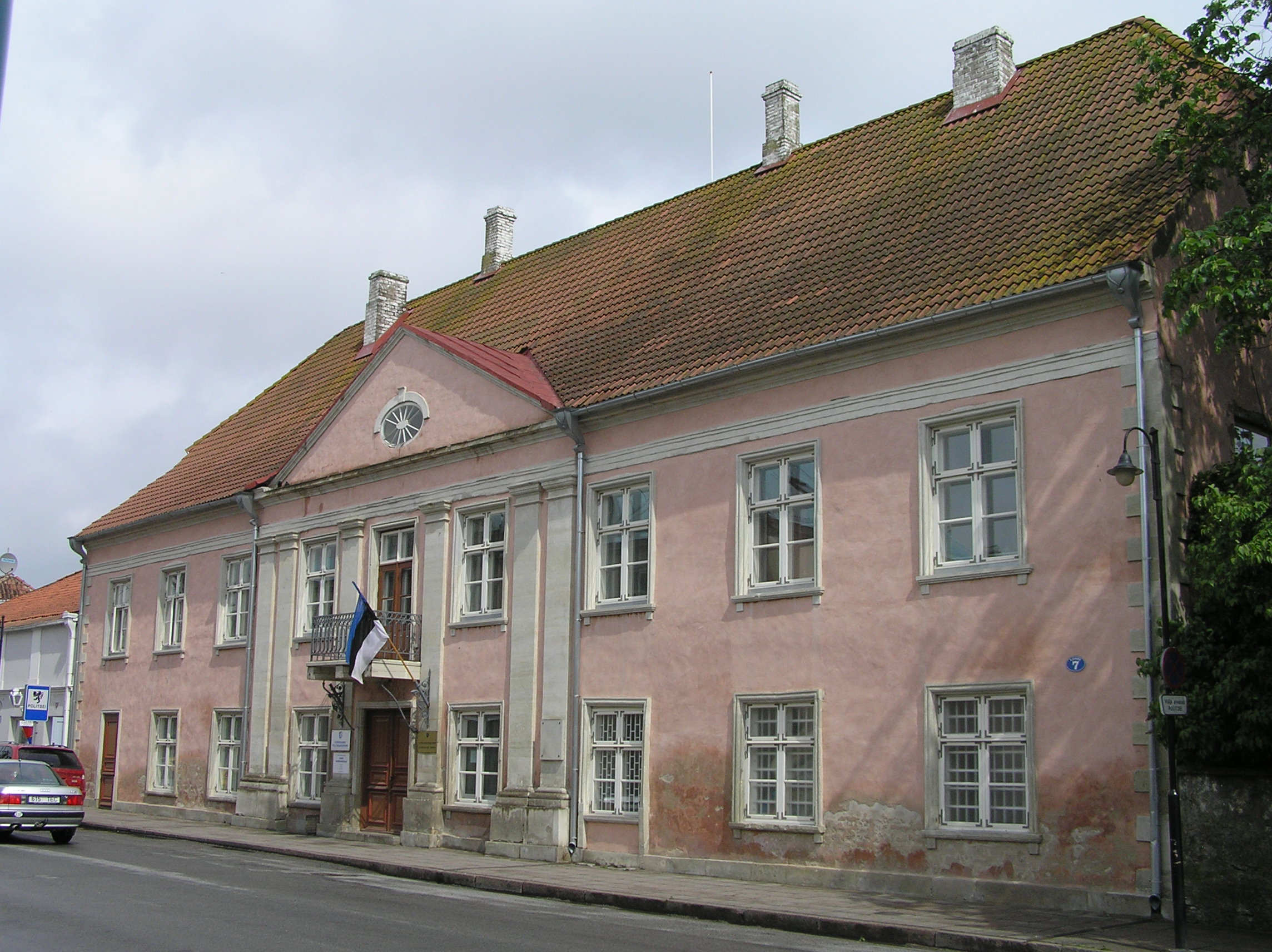 Ulice i budowle w Kuressaare, Estonia